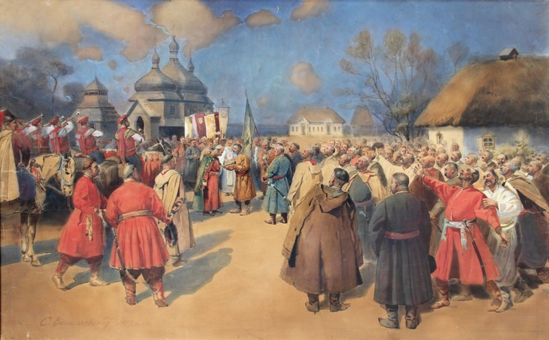 Вибори полковником Мартина Пушкаря: Панно з Полтавського земства